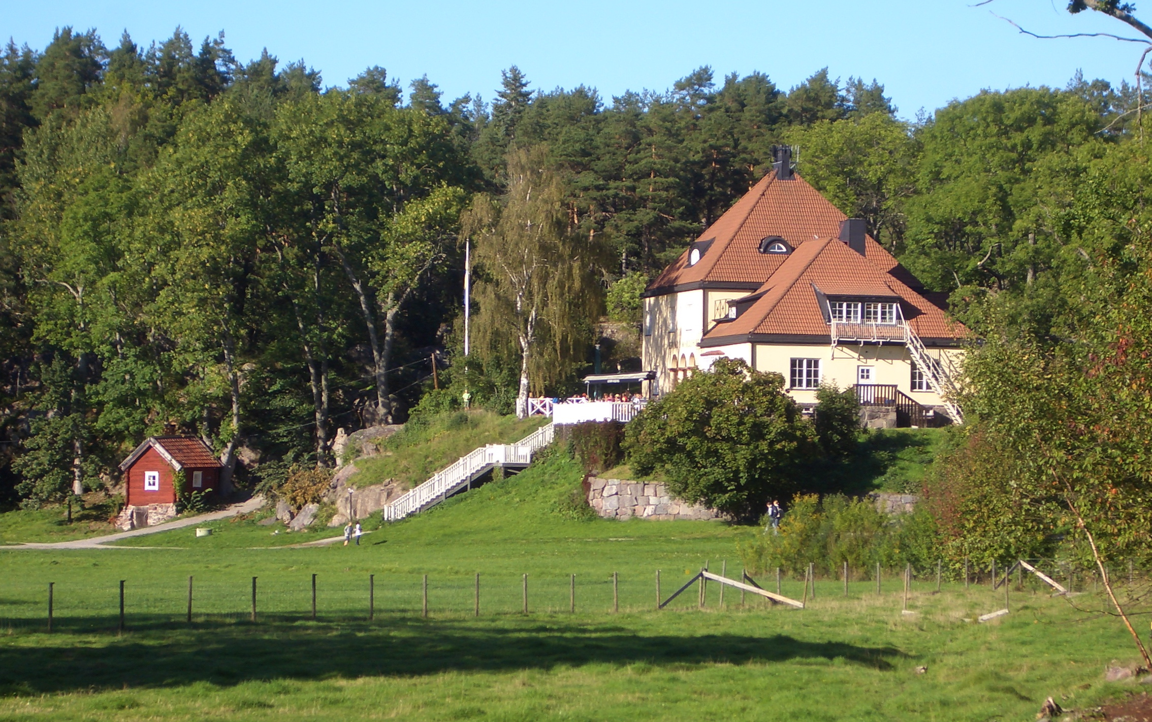 Värdshuset on Grinda. Photo by Brion Vibber, September 16, 2006.